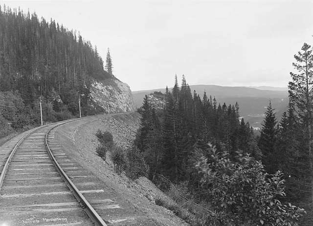 Meråkerbanen ca. 1880, fotograf Axel Lindahl (1841-1906), bildet er hentet fra Nasjonalbibliotekets billedsamling.